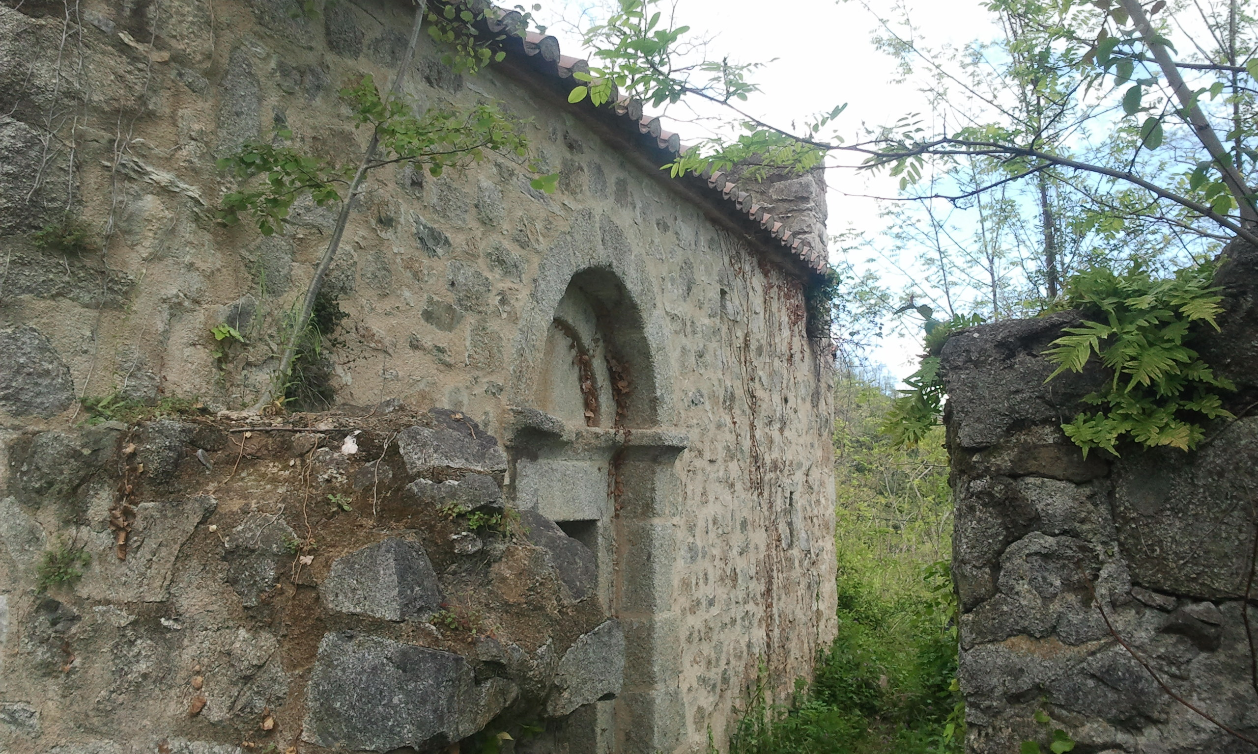 Façade sud de Sainte-Cécile de Cos